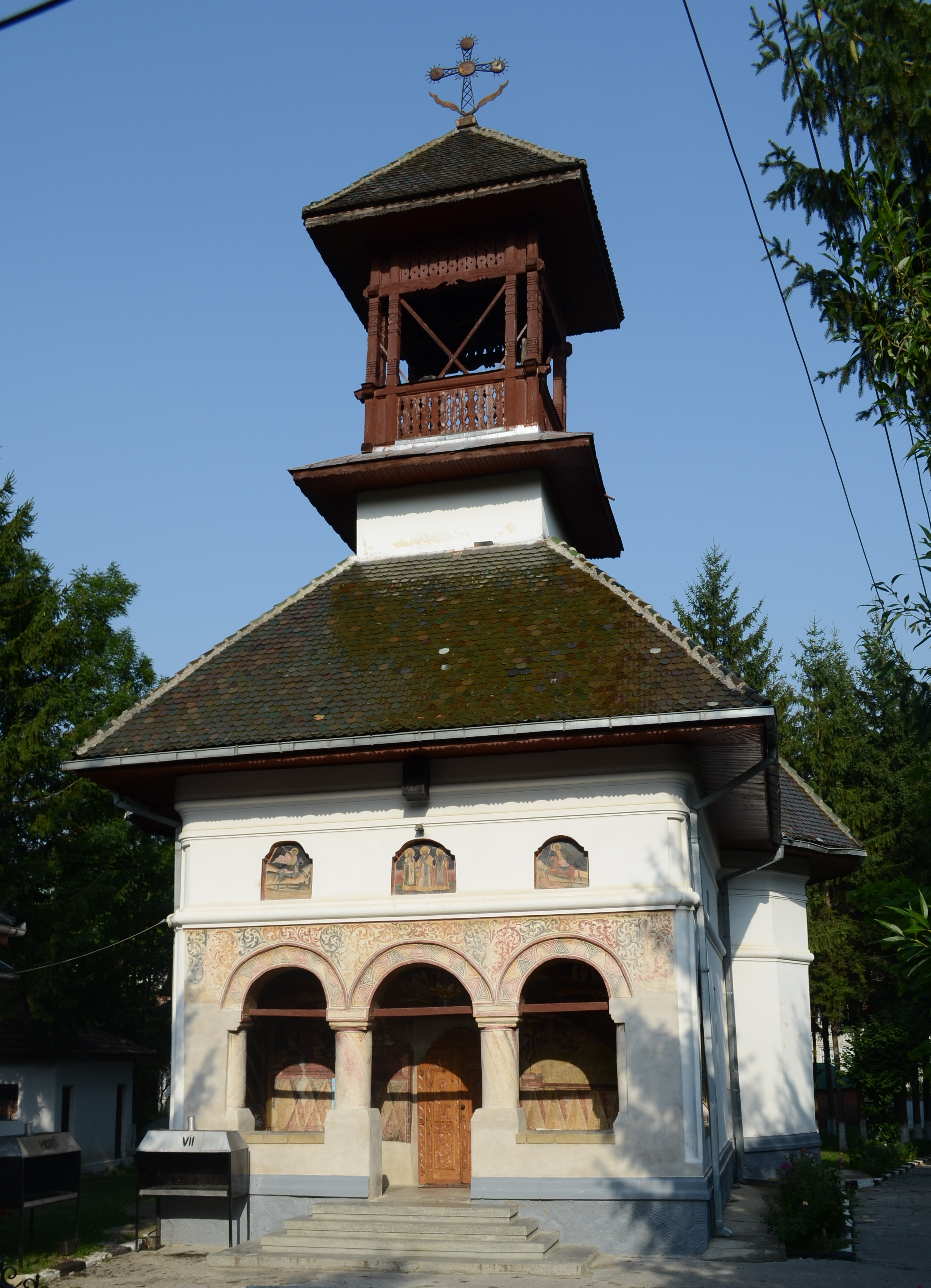 Biserica "Sfinții Trei Ierarhi", Slănic, Prahova